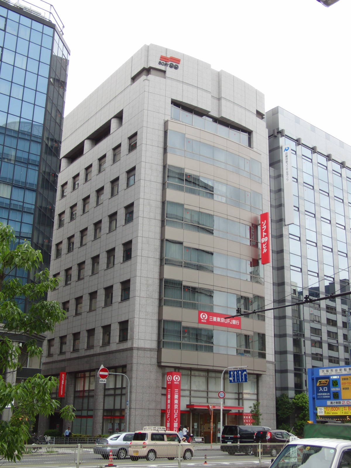 ソフト99コーポレーション本社を撮影